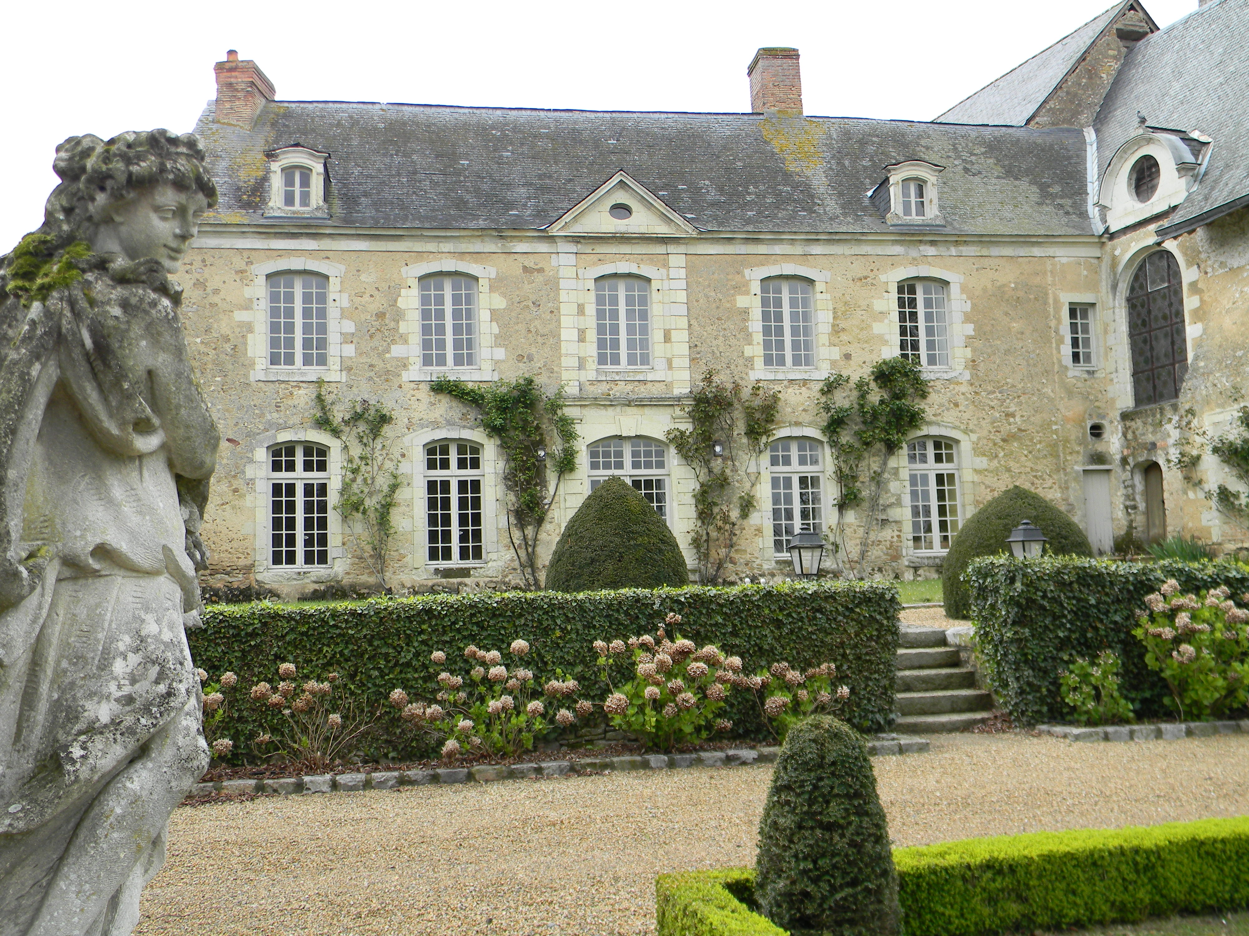 le presbytère de Brissarthe, construit au XVIIIè siècle sur l'emplacement du bras droit de transeprt de l'église Notre Dame